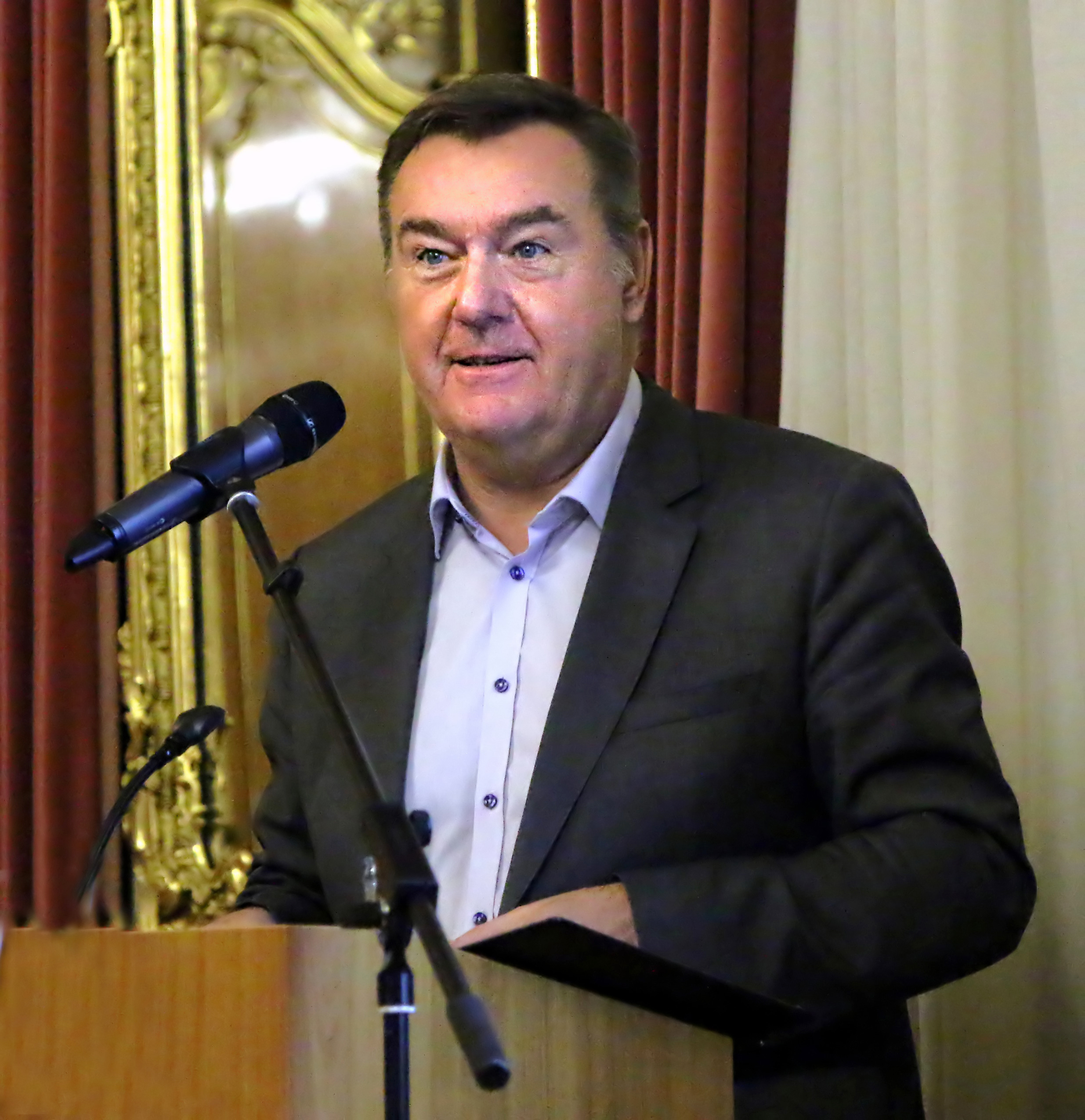 Claus Kaminsky, Oberbürgermeister von Hanau, bei der Verleihung der Grimm-Bürgerdozentur im Schloss Philippsruhe (Roter Saal) an Dr. Irene Wellershoff im Jahr 2018